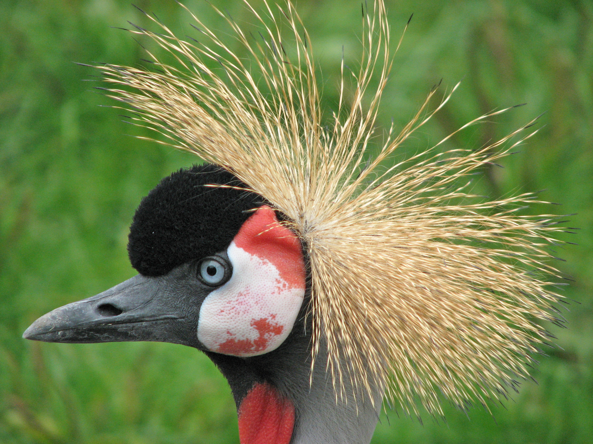 Balearica regulorum. Kronenkranich im Tierpark Hamm